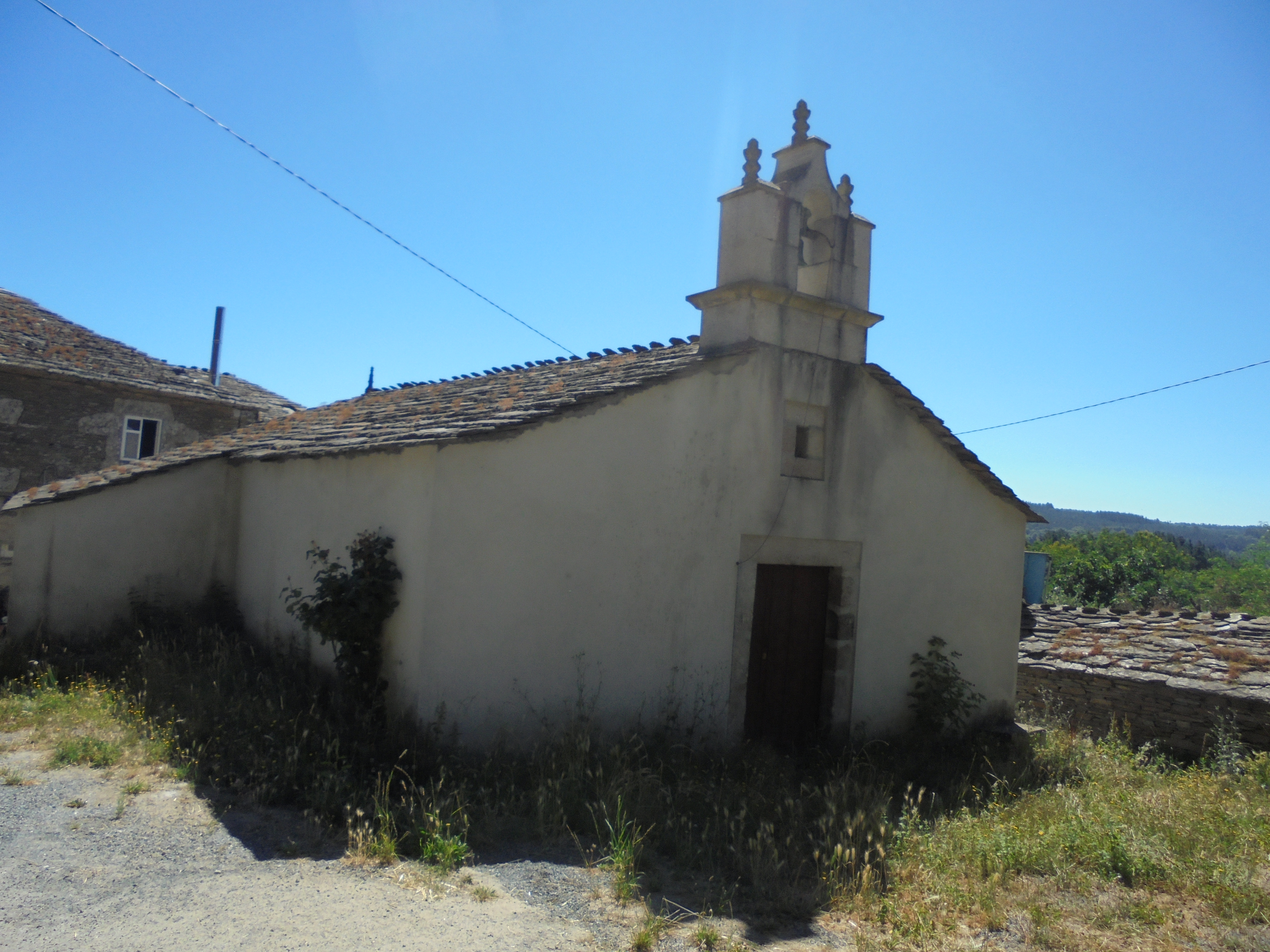 Capela de San Mamede de Ribas de Miño ( Lugo)